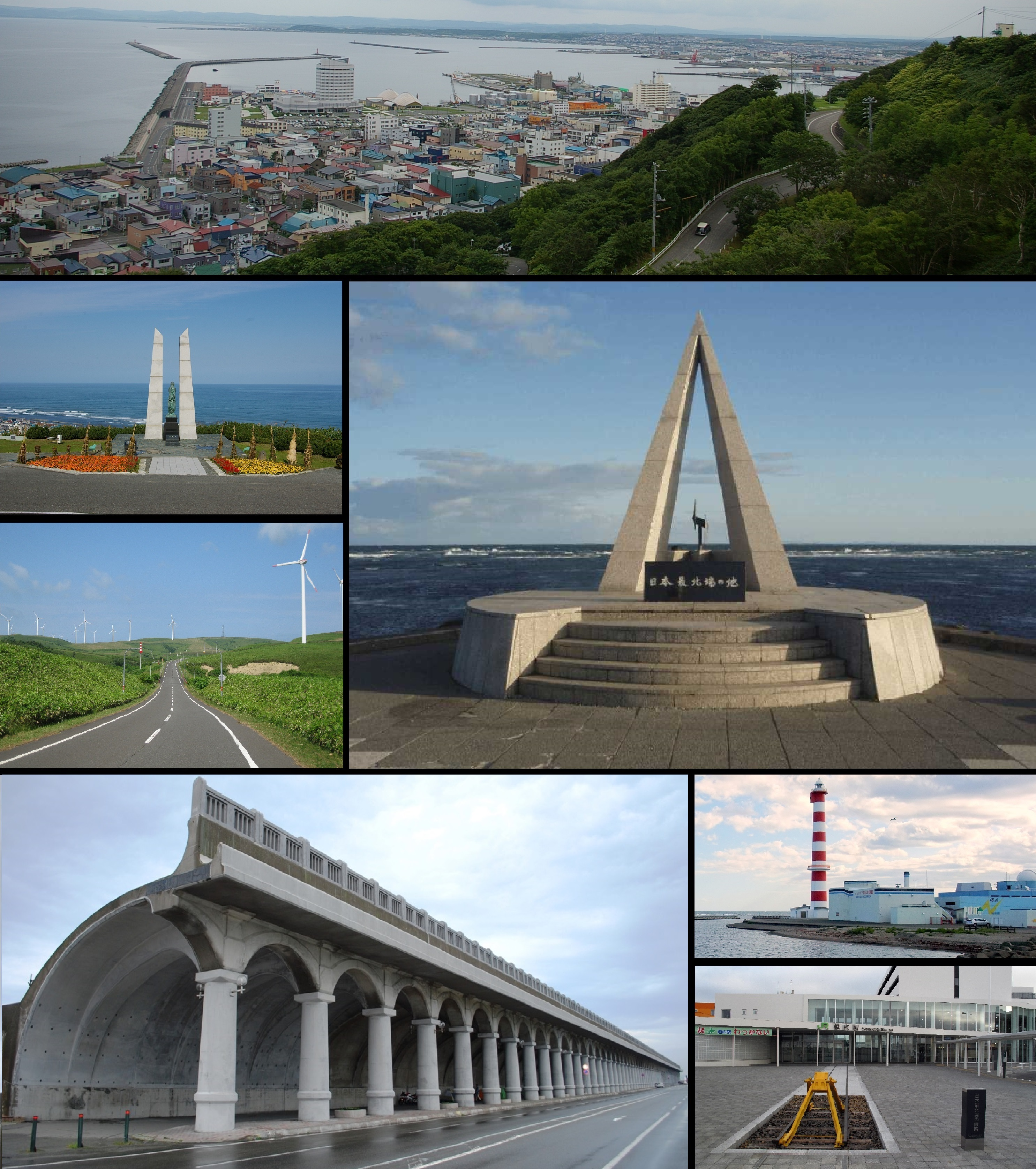 File:Wakkanai harbor.JPG File:Cape Soya 2007.jpg File:Hyousetsu no mon.JPG File:Soya wind farm.JPG File:防波堤ドーム-01.JPG File:稚内灯台 - panoramio.jpg File:Wakkanai Station1.JPG 以上7画像を使用しUser:Halowandが作成